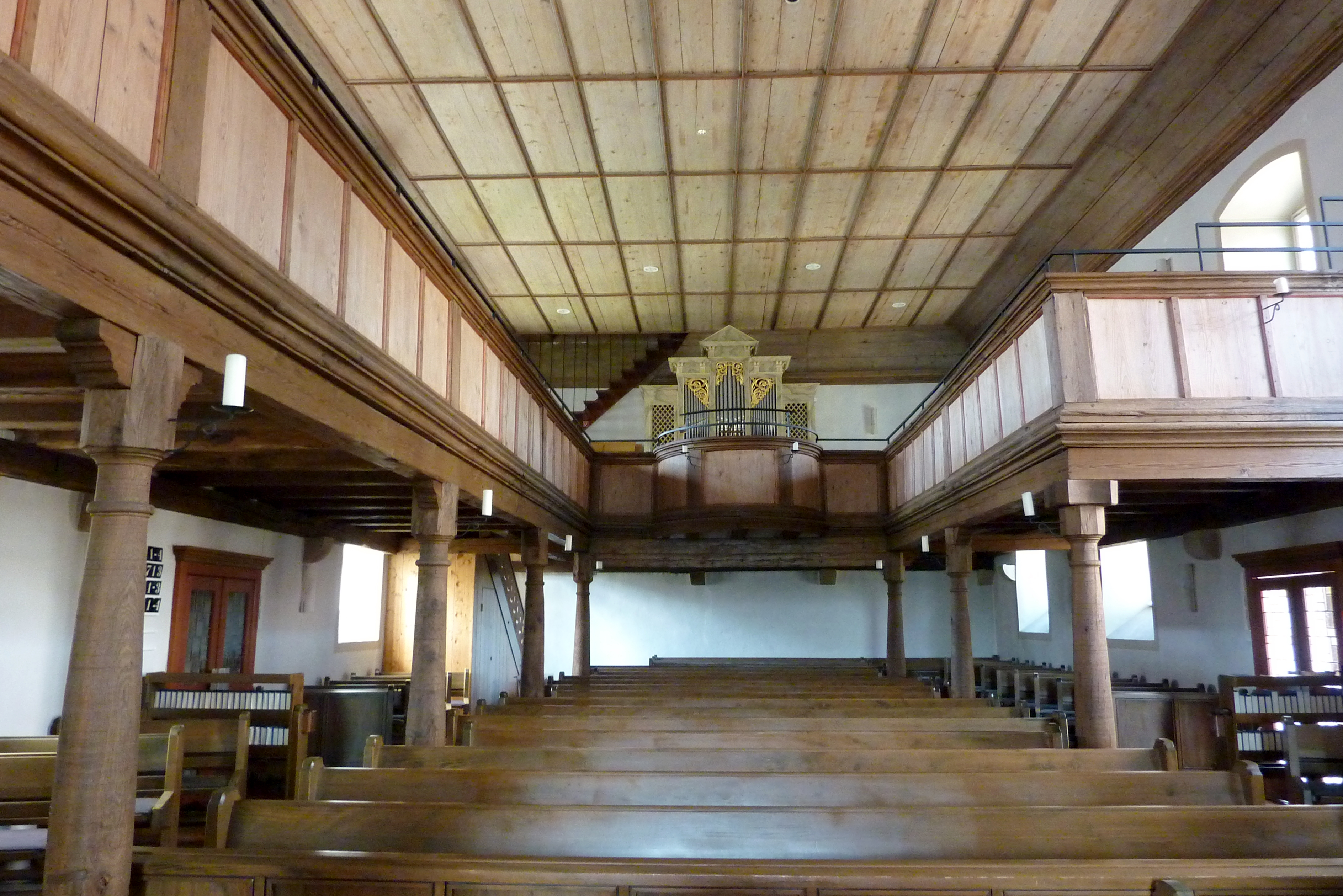 Evangelische Pfarrkirche St. Peter und Paul in Oberderdingen (im ehemaligen Dorf Unterderdingen) in Baden-Württemberg, Innenraum